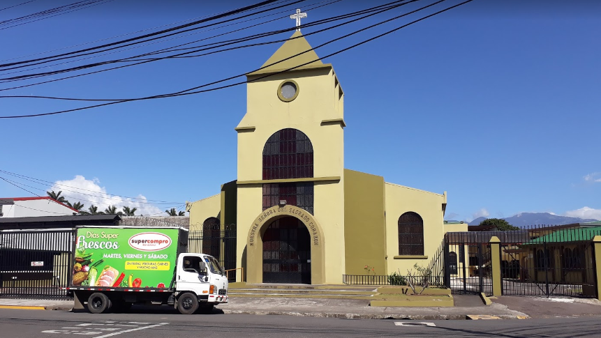 Parroquia de Llorente, en Tibás, Costa Rica.